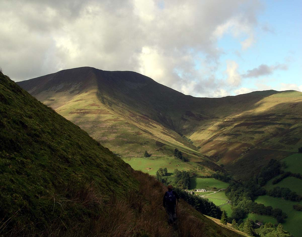 Maesglase, Snowdonia